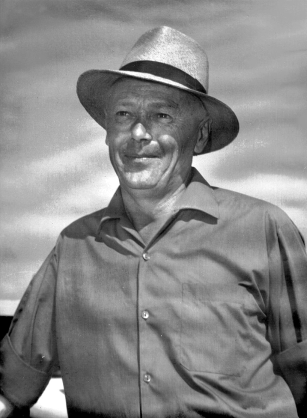 Heinz_Hütt, de Alemania Occidental, campeón de la clase standard del Campeonato Mundial de Vuelo a Vela de 1963, realizado en Junín, Argentina.